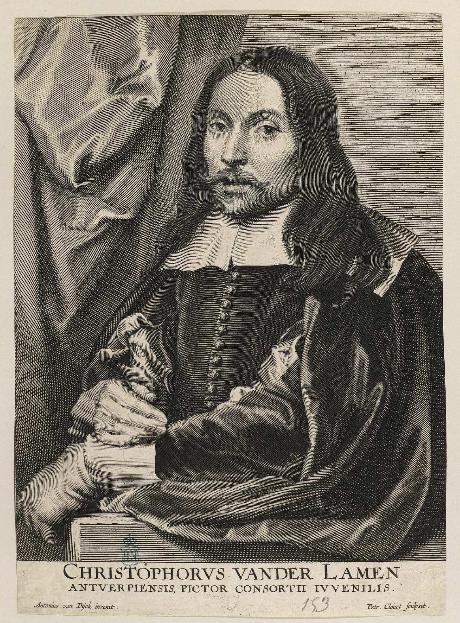 Retrato de Christoffel Jacobsz. van der Lamen, grabado a buril de Peeter Clouwet por pintura de Anton van Dyck. Inscripción: CHRISTOPHORVS VANDER LAMEN / ANTVERPIENSIS PICTOR CONSORTII IVVENILIS. Biblioteca Nacional de España